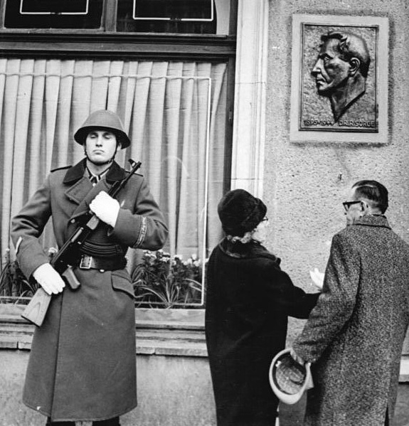 Berlin, Namensgebung Richard-Sorge-Straße Zentralbild Brüggmann 6.11.69 Berlin: Die Tilsiterstraße im traditionsreichen Berliner Arbeiterbezirk Friedrichshain wurde am 6.11.69 feierlich in Richard-Sorge-Straße umbenannt. Hier enthüllt Max Christiansen-Clausen, der Funker des mutigen Kundschafters, mit seiner Frau Anna eine Gedenktafel. Sie erinnert an den Helden der internationalen Arbeiterbewegung, der am 7. November 1944 von der japanischen Reaktion ermordet worden war. [Berlin.- Namensgebung Richard-Sorge-Straße, Wachtposten des Wachregiments Feliks E. Dzierzynski neben Gedenktafel für Richard Sorge]